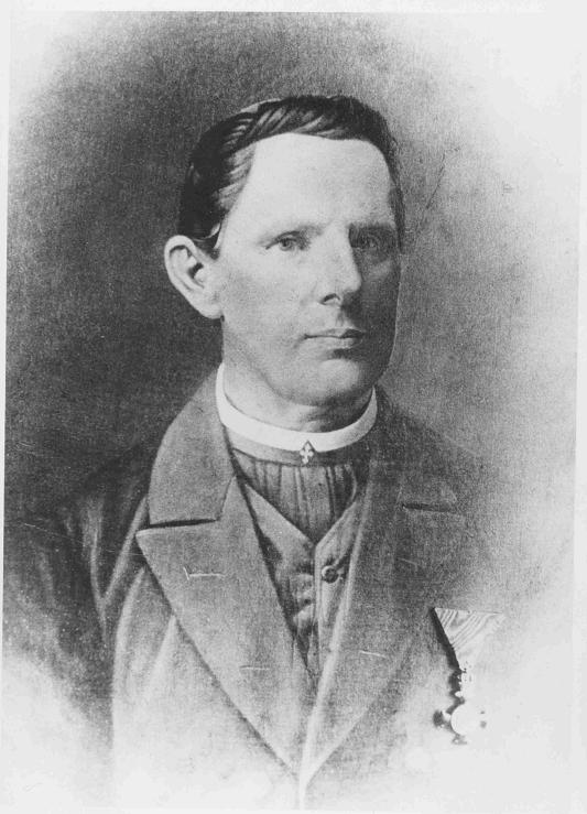 monsignor, malíř a spisovatel Bedřich Kamarýt